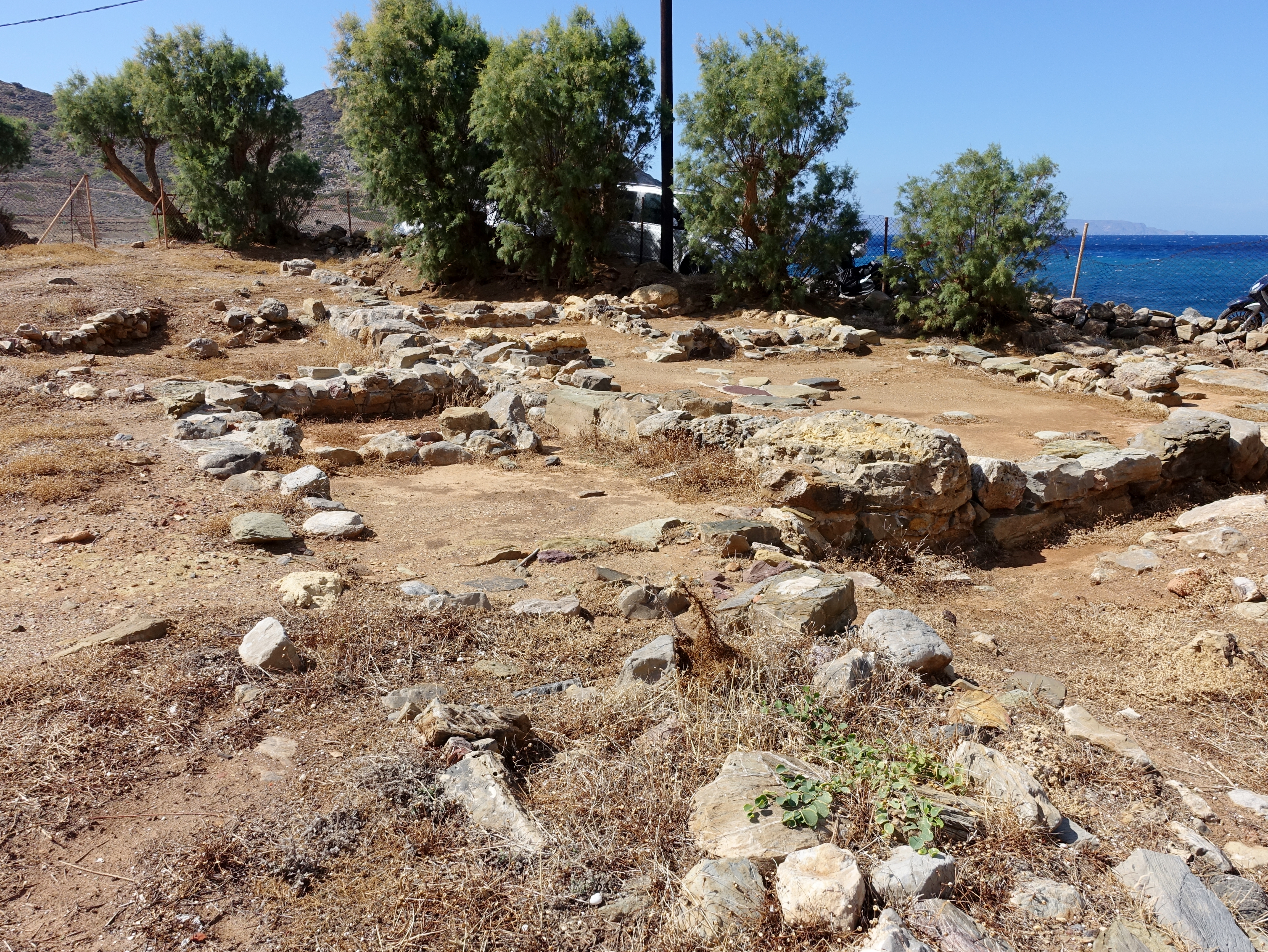 Gebäude B des Handwerkerviertels aus spätminoischer Zeit (SM I B, ca. 1500–1425 v. Chr.) der Ausgrabungsstätte am westlichen Ortsrand von Mochlos (Μόχλος), Kreta, Griechenland